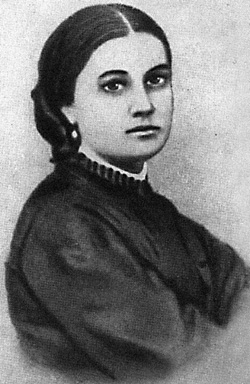 Марко Вовчок, українська письменниця